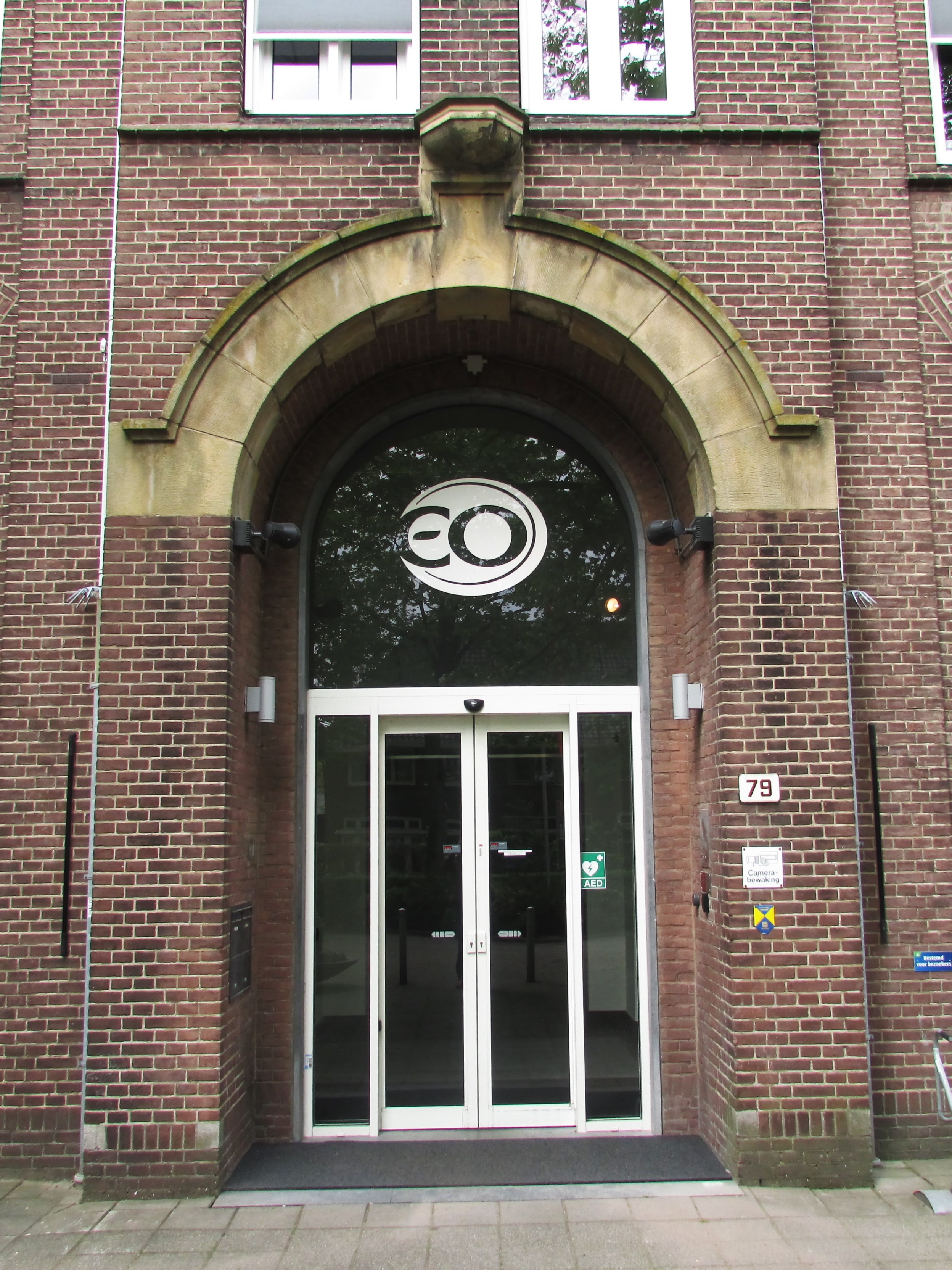 Entree van de Evangelische Omroep op de Oude Amersfoortseweg 79. Gemeentelijk monument.